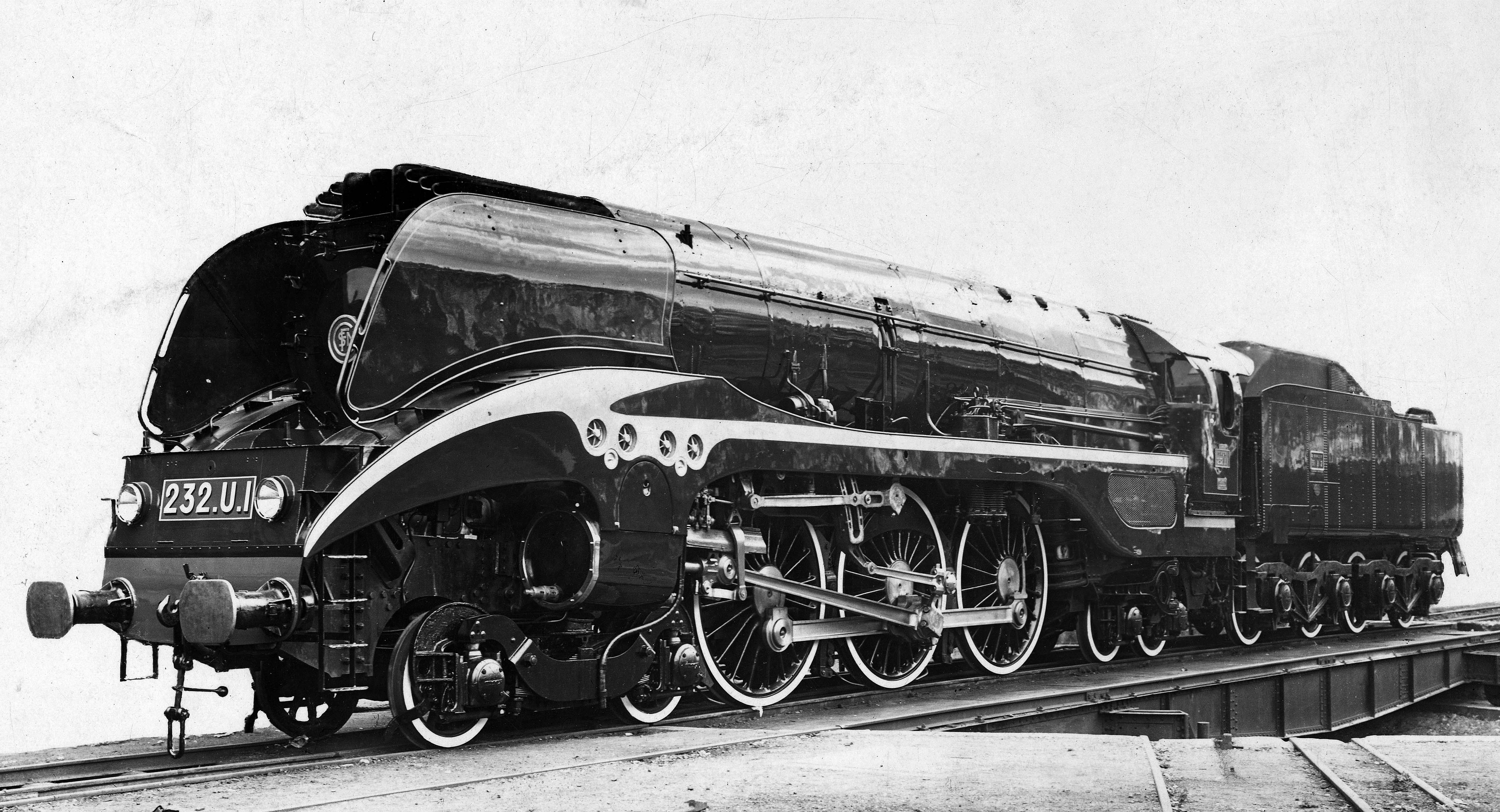 Locomotive à vapeur 232 U 1 SNCF sur la plaque tournante de l'usine Corpet-Louvet à La Courneuve. Photo de l'entreprise prise sans doute lors de la sortie des ateliers en mai 1949.